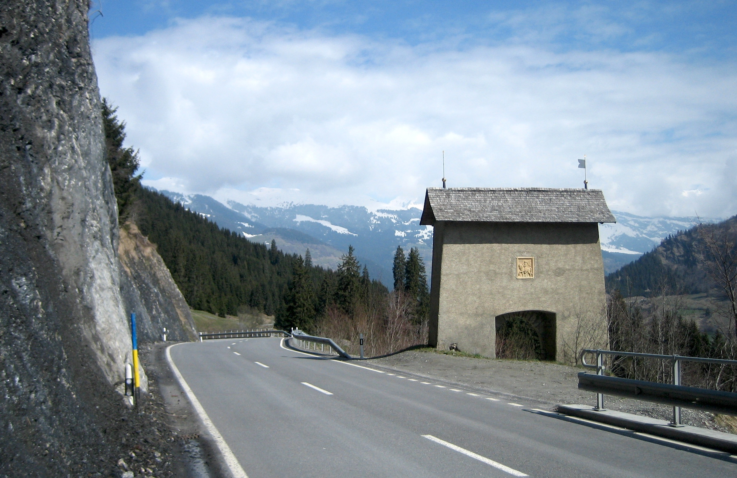 Die Porclas von Süden